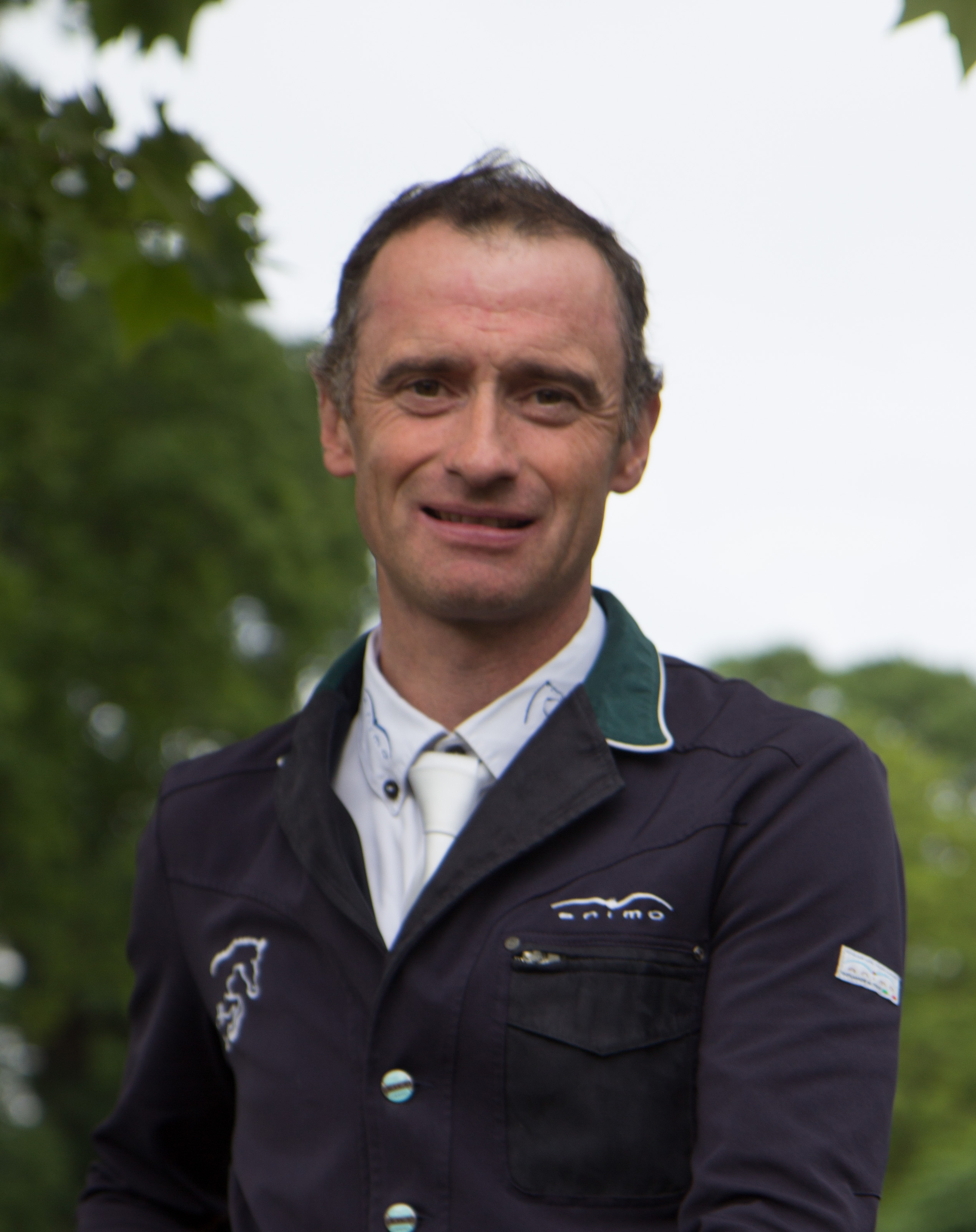 Internationales Wiesbadener Pfingstturnier 2018. CSI 4* Springprüfung KI.S *** m. Stechen (1,50m) "Preis des Hessischen Ministerpräsidenten": Denis Lynch auf Fairview Aliquidam